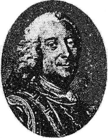 Portrait of Bernard Forest de Bélidor